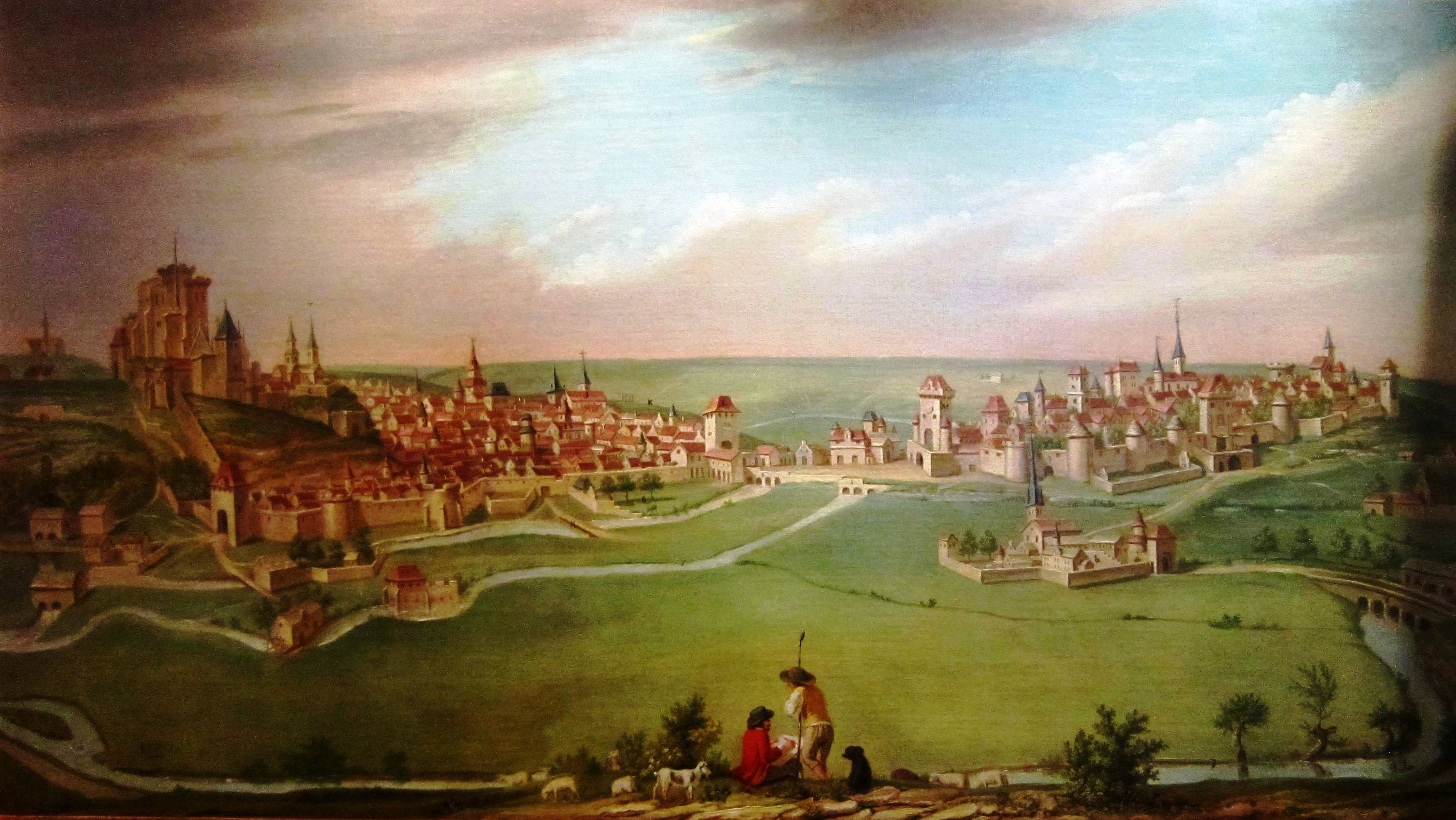 Tableau représentant la ville de Châtillon-sur-Seine au Moyen-Age